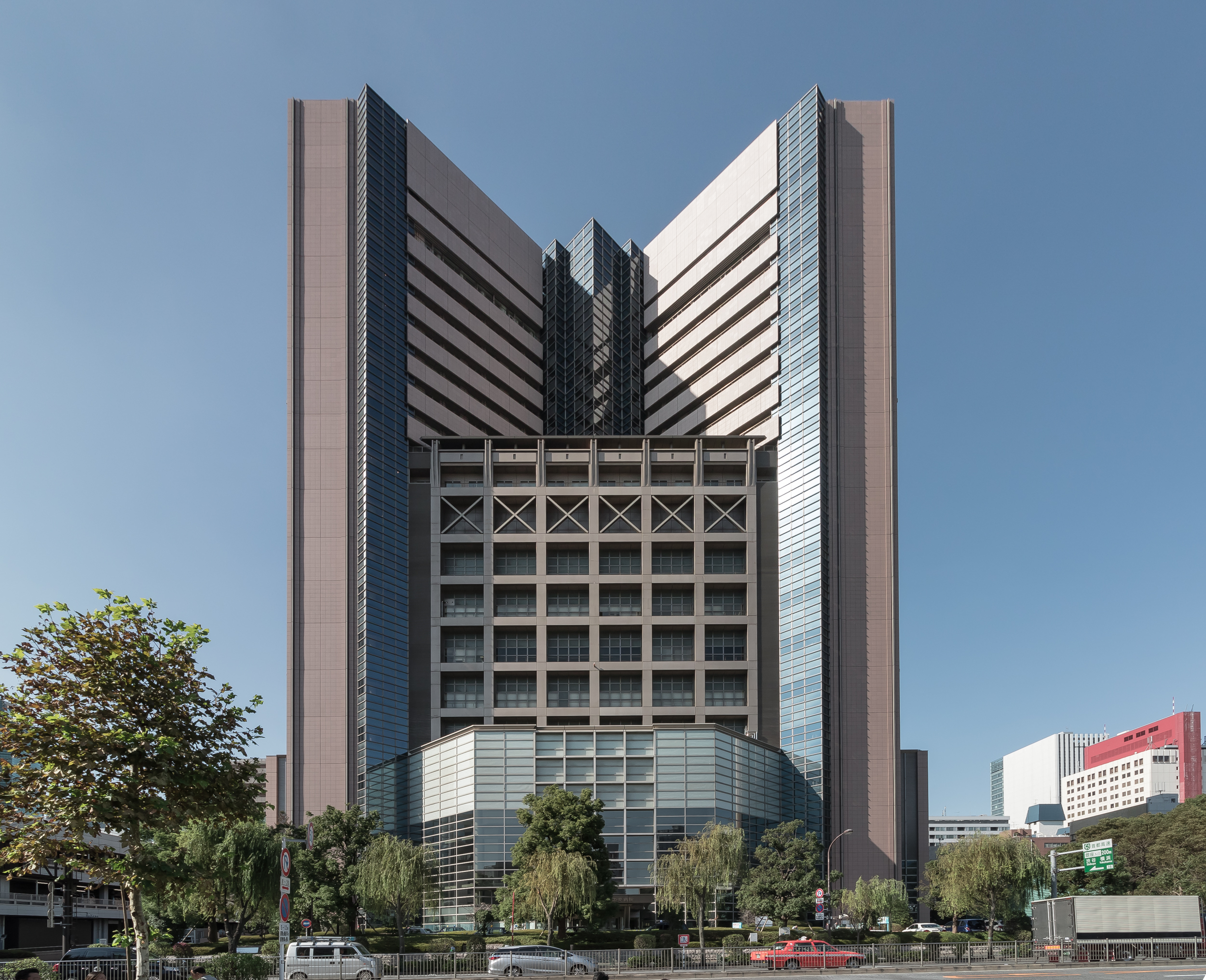 国立がん研究センター中央病院（東京都中央区）。横河建築設計事務所。